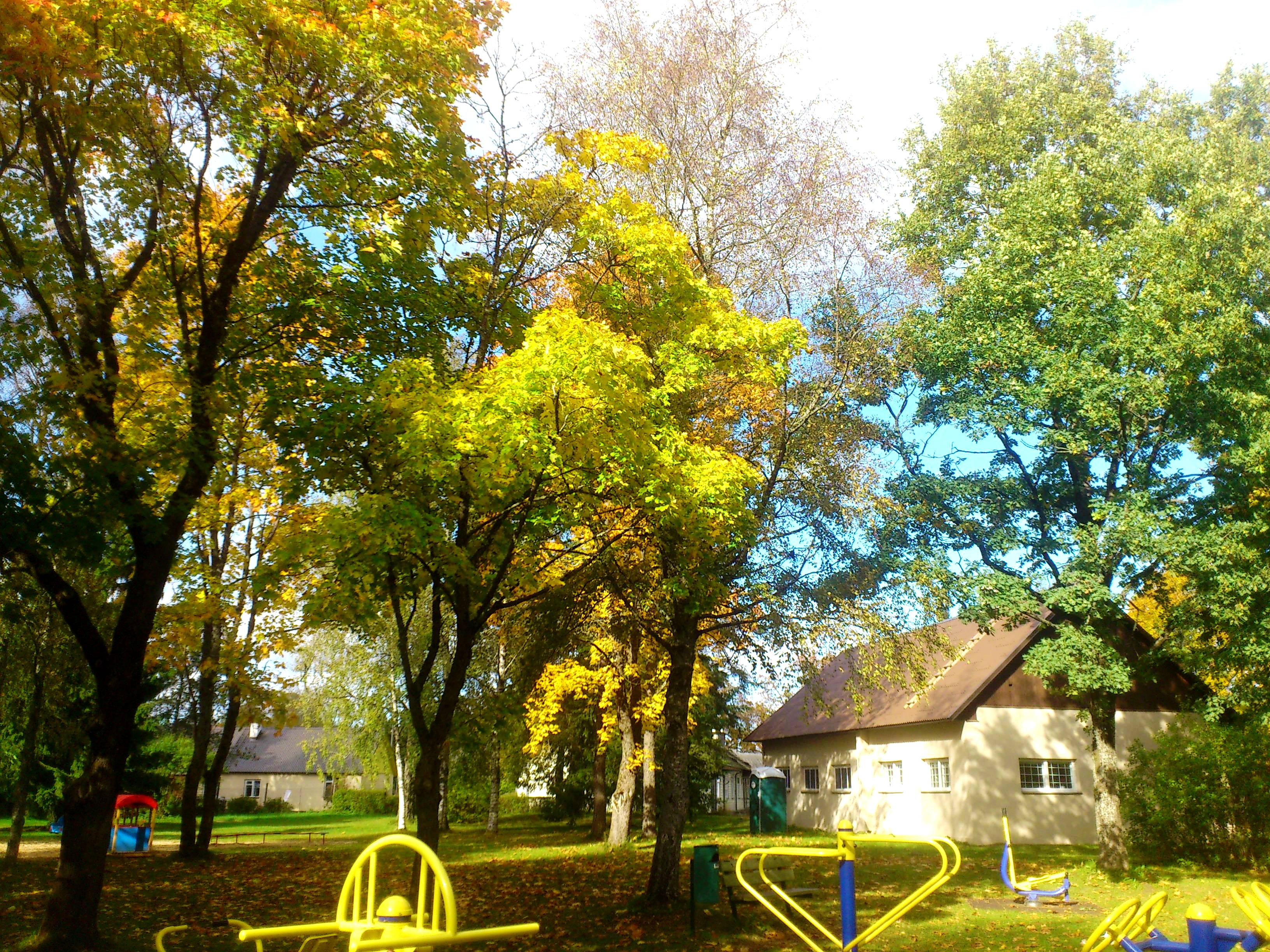 Красочный Детский парк в посёлке Кохила.